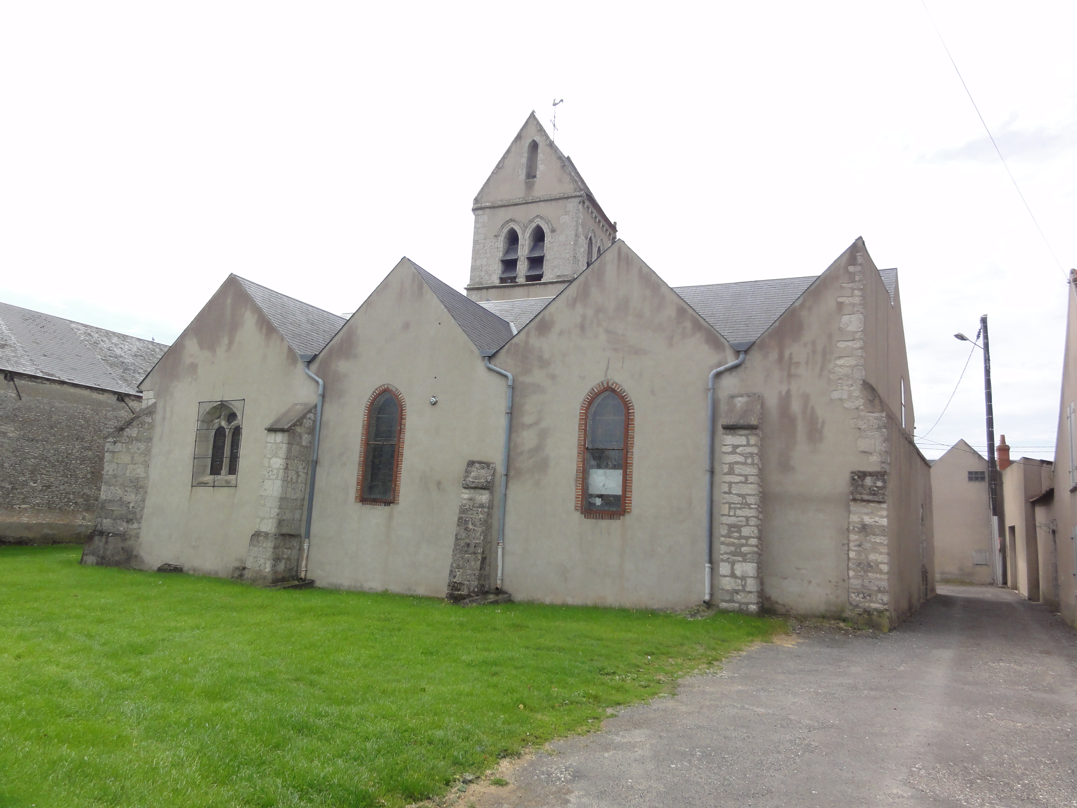 Andonville (Loiret) Église